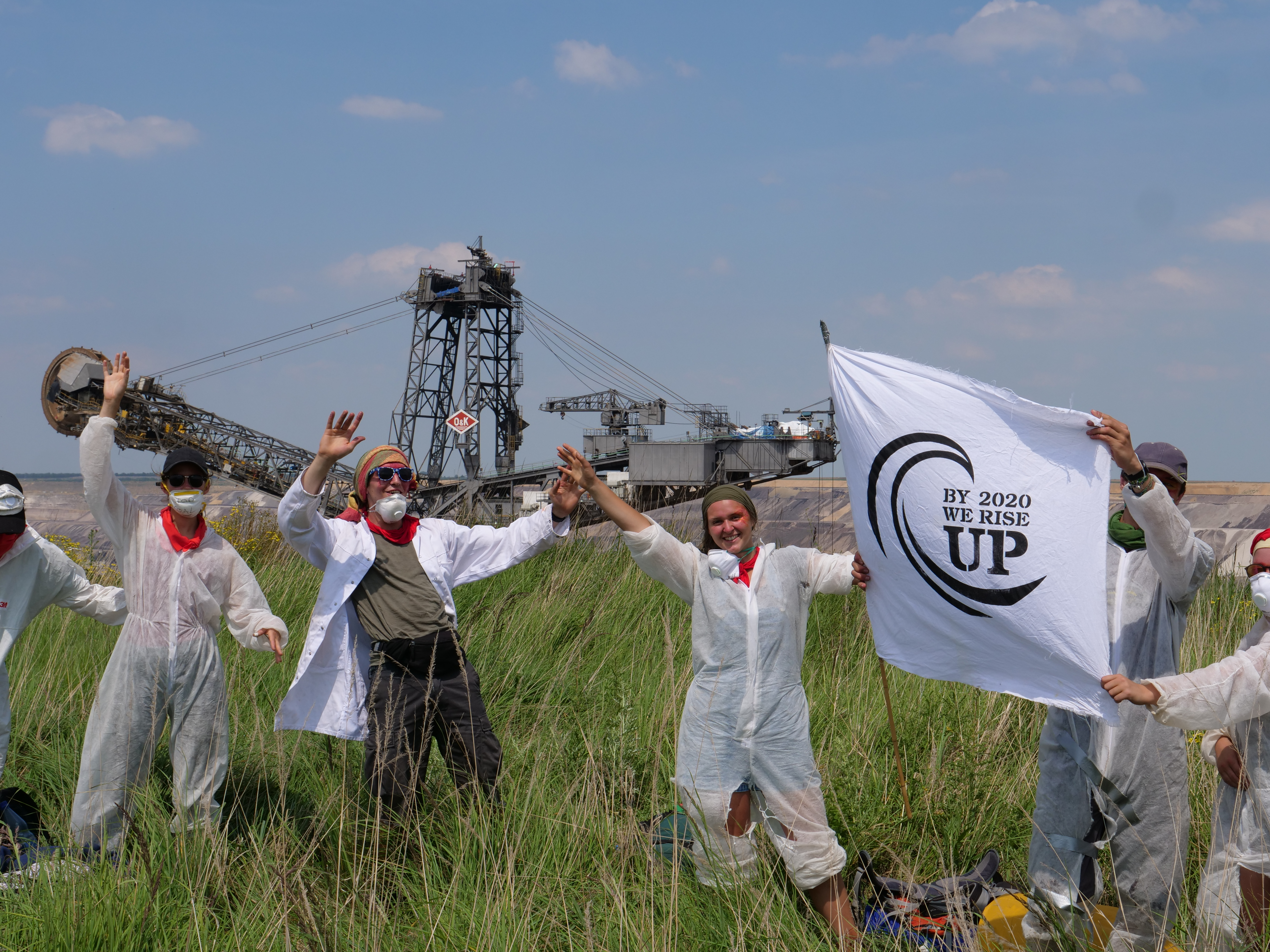 Teil des Roten Fingers von Ende Gelände oberhalb der Abbruchkante des Tagebaus Garzweiler am 22. Juni 2019.